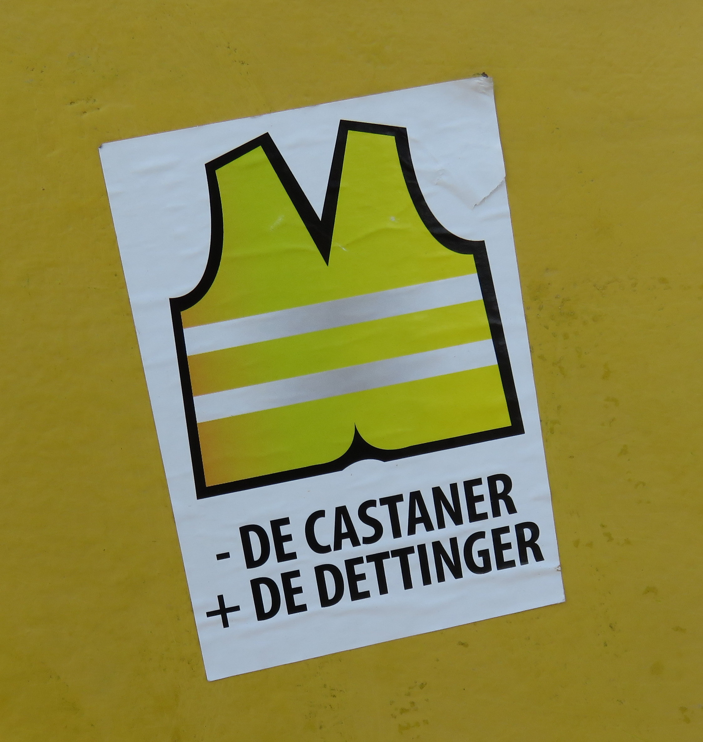 Autocollant montrant un gilet jaune et la mention "- de Castaner + de Dettinger", sur une boîte aux lettres, quai Perrache, dans le 2e arrondissement de Lyon.